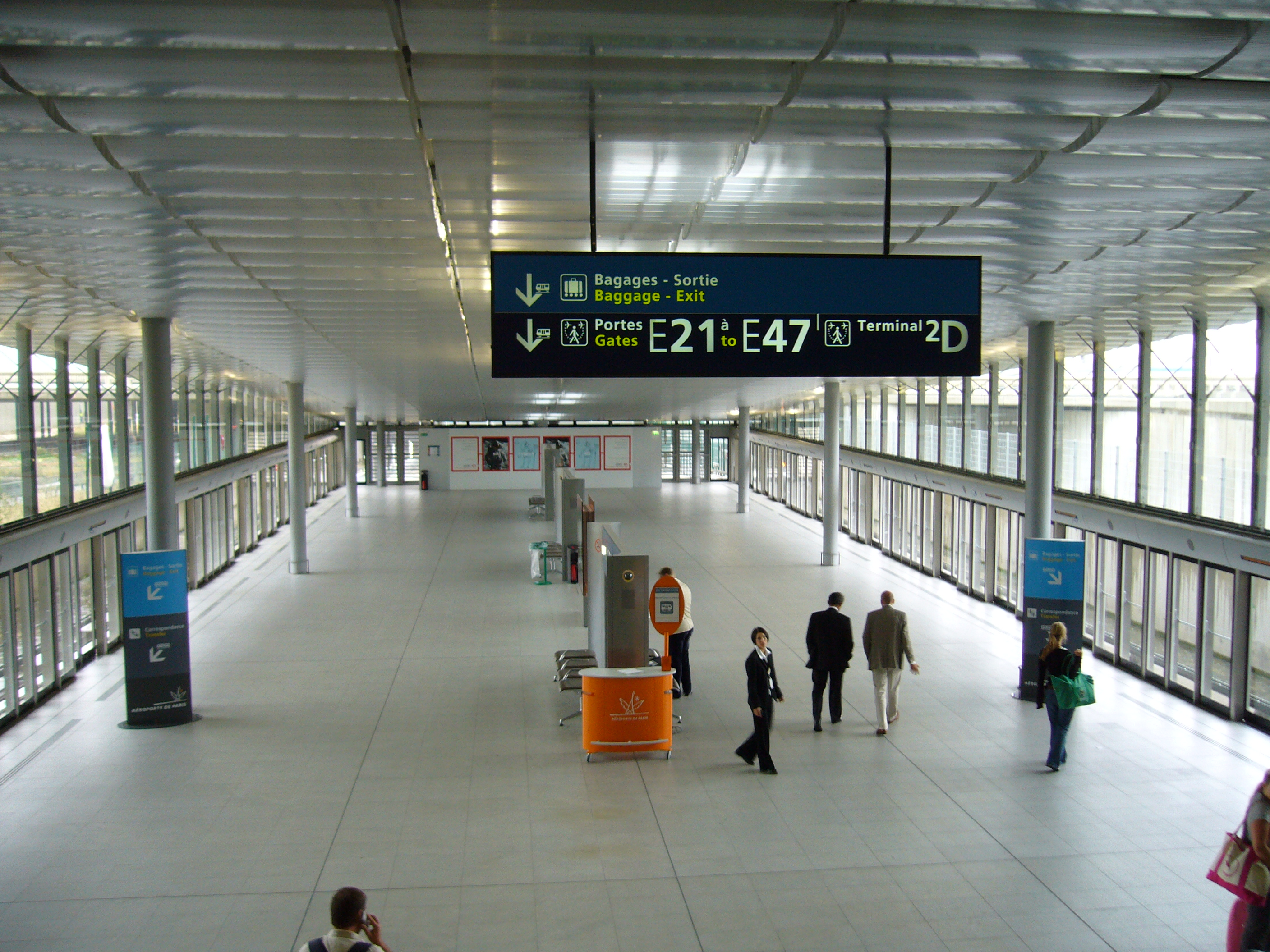 Val LISA à l'aéroport CDG.